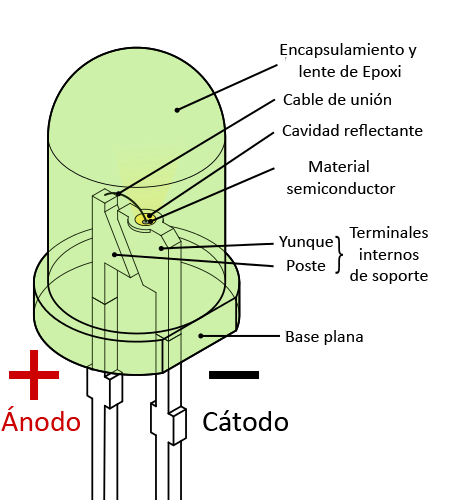 LED y sus partes